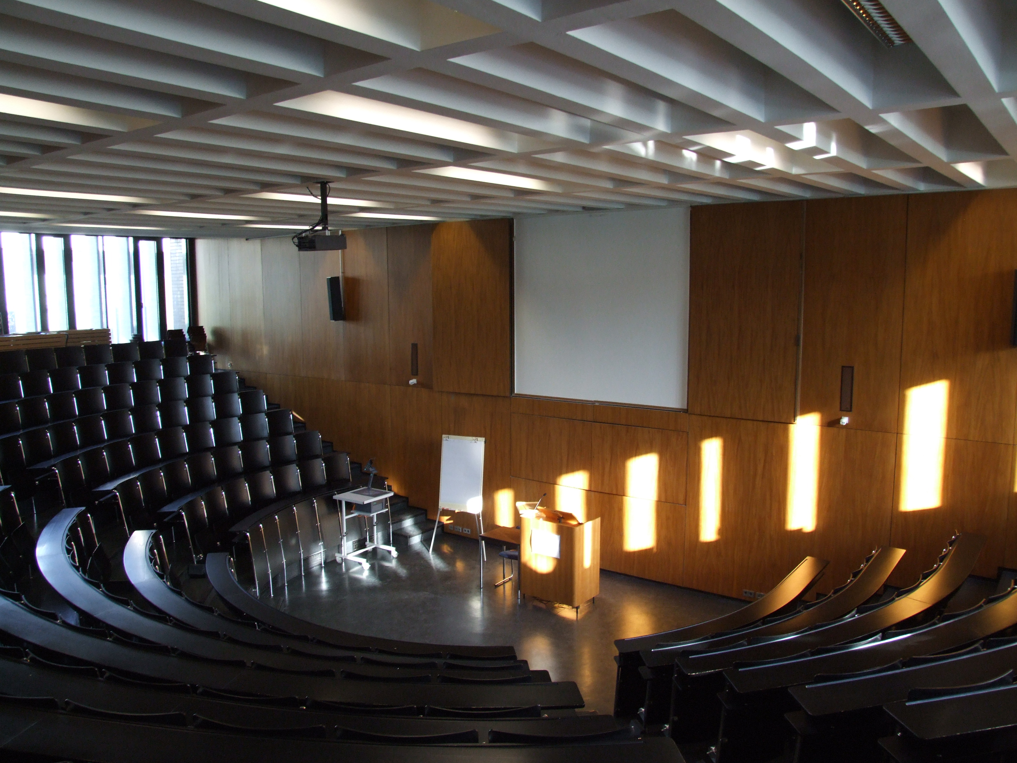 Universität Speyer, Freiherr-vom-Stein-Str. 2: Audimax, entworfen von Sep Ruf